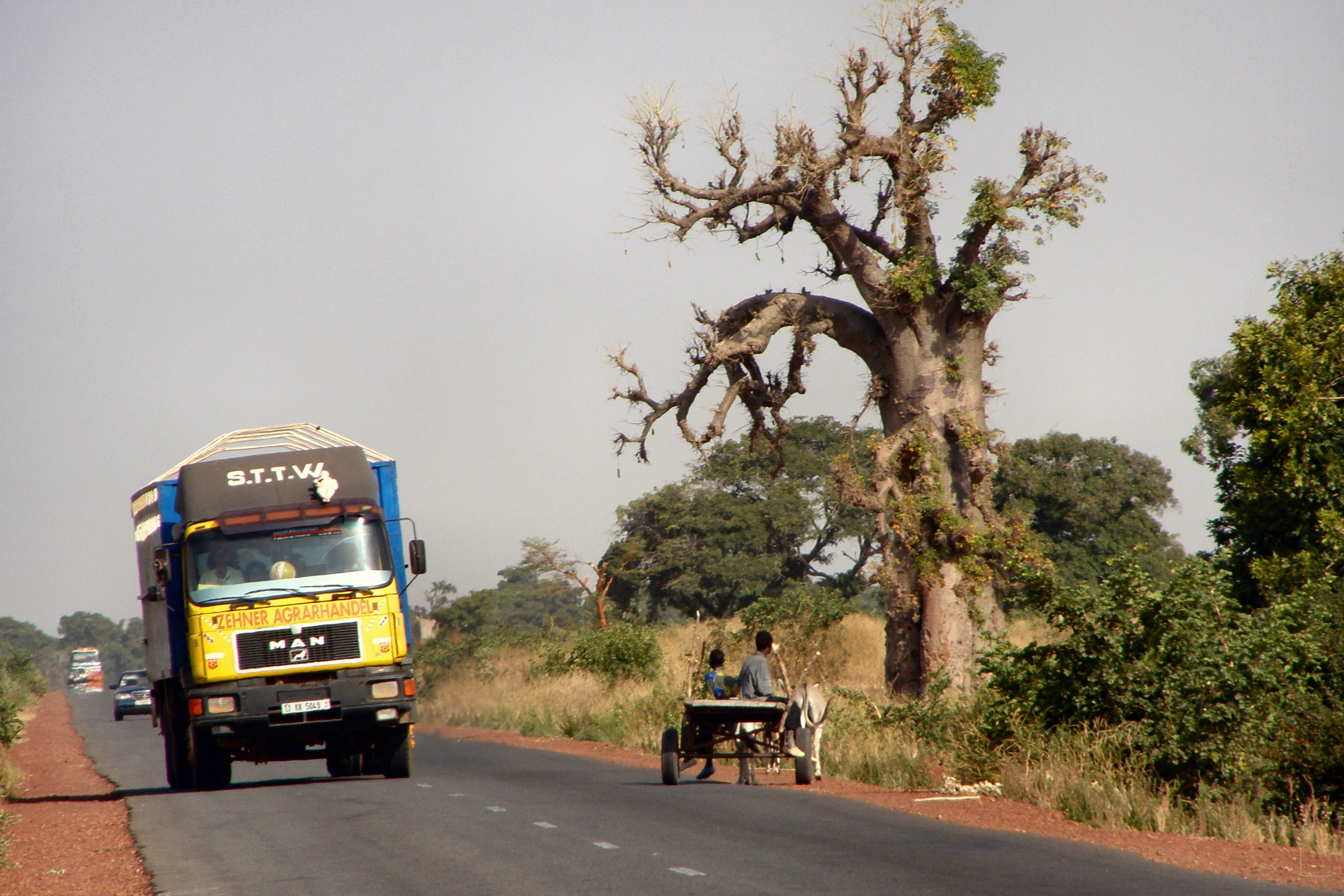 Deux moyens de transports se croisent entre Ségou et Mopti - Mali